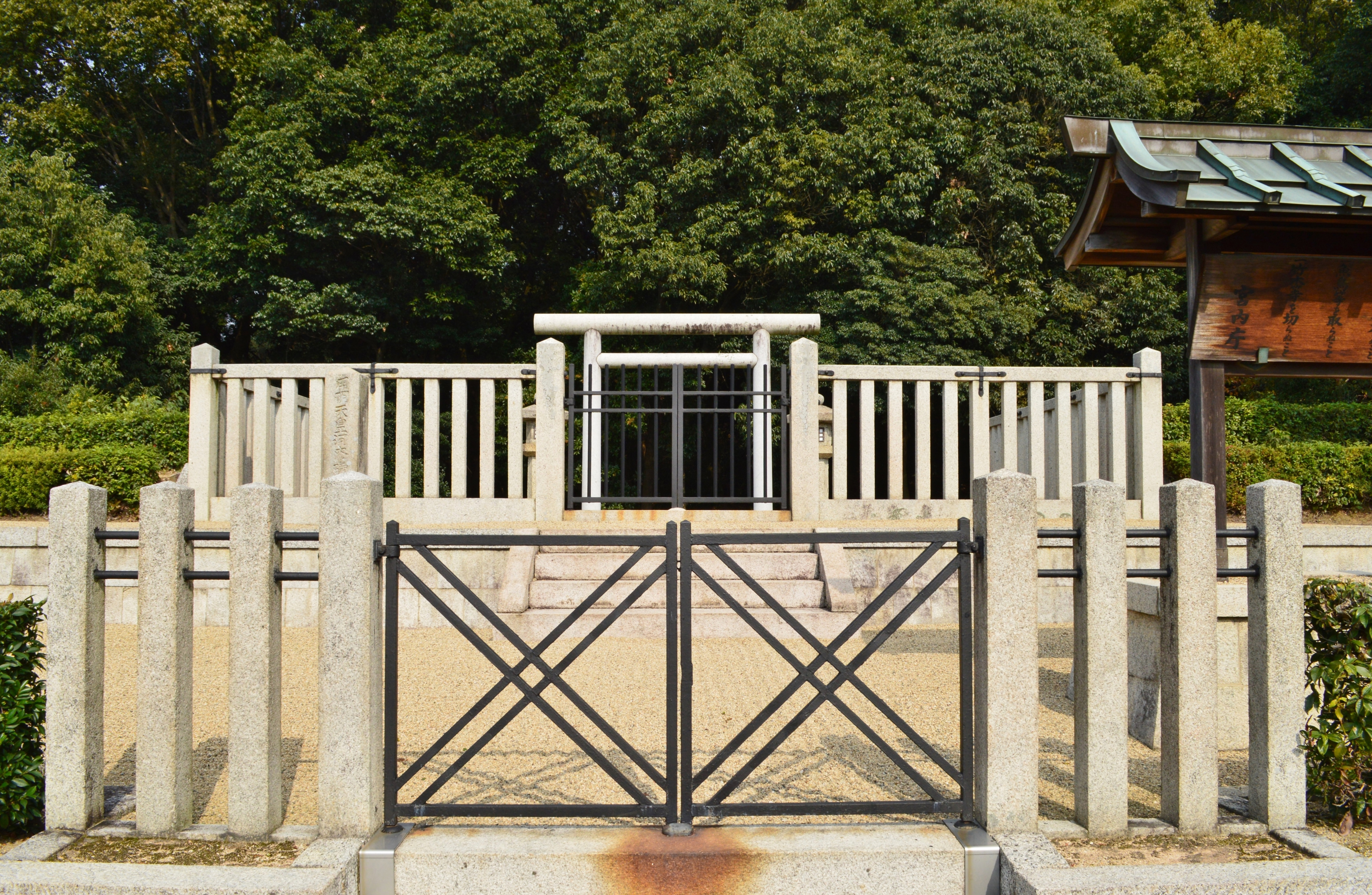 用明天皇河内磯長原陵 拝所